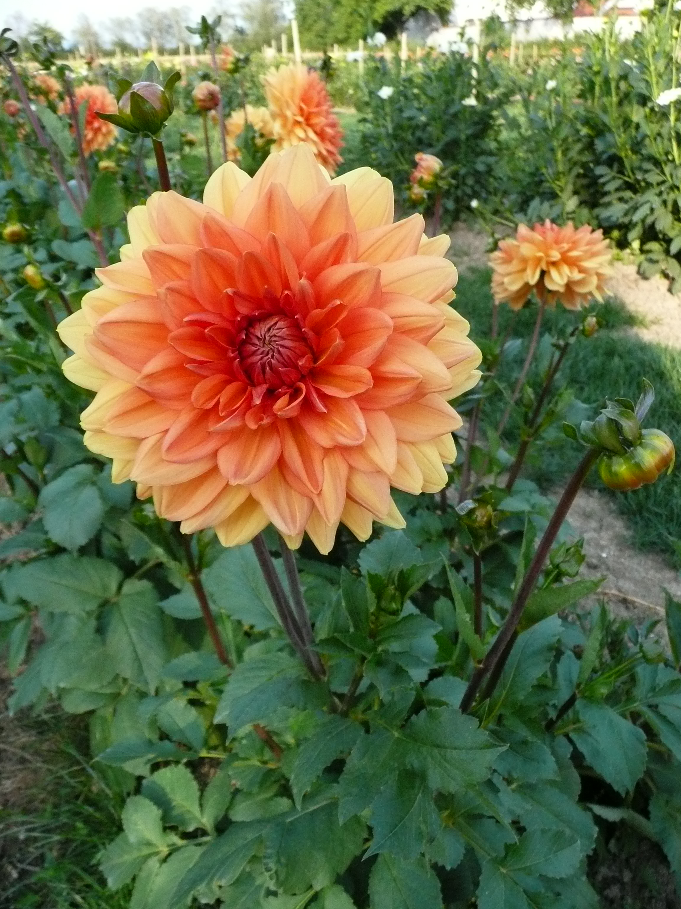 Dekorative Dahlie Erntedank, gezüchtet von Siegfried Engelhardt (Deutschland), 1994